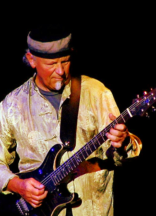 Gemaakt op 5 mei in het Teatro Nazionale, Milaan, Italië.